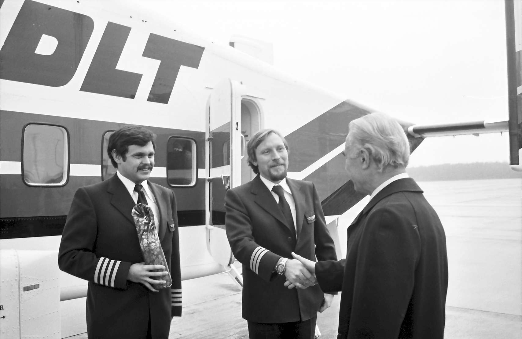 Basel (CH) - Mulhouse (F): Ankunft einer DLT Maschine aus Frankfurt auf dem Flughafen; Regierungspräsident empfängt Mannschaft (W 134 (Neg. BaWü), Teil 2 Sammlung Willy Pragher I: Filmnegative Baden-Württemberg, Teil 2)